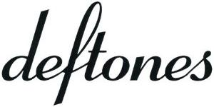 Deftones original logo